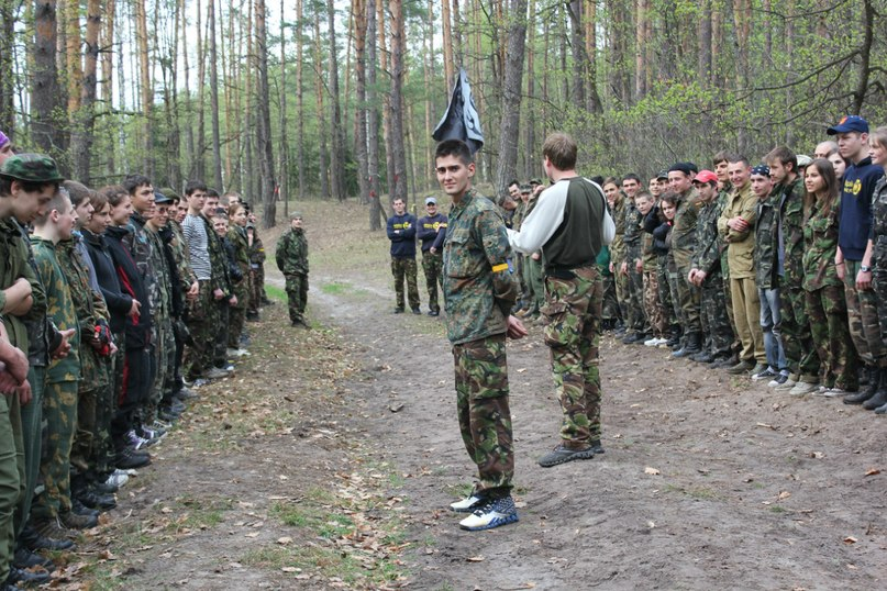 Всеукраїнська теренова гра "Гурби-Антонівці - 2013". Знайомство команд. Роман Атаманюк у ролі чотового "жовтих". Фото зроблене активістом ВМГО "Молодіжний націоналістичний конгрес"